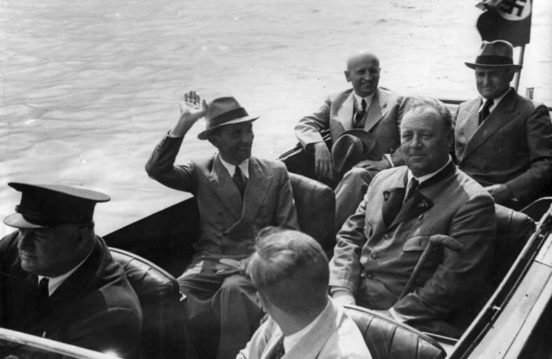 St. Wolfgang, Goebbels und Emil Jannings ADN-ZB/Archiv Faschistisches Deutschland 1933-1945 Der faschistische Propagandaminister Goebbels (Mitte, links) und der Schauspieler Emil Jannings (Mitte, rechts) bei einer Bootsfahrt 1938 auf dem Wolfgangsee. 9682-38 Abgebildete Personen: Goebbels, Joseph: Reichsminister für Volksaufklärung und Propaganda, Gauleiter Berlin, Deutschland Jannings, Emil: Schauspieler, Deutschland